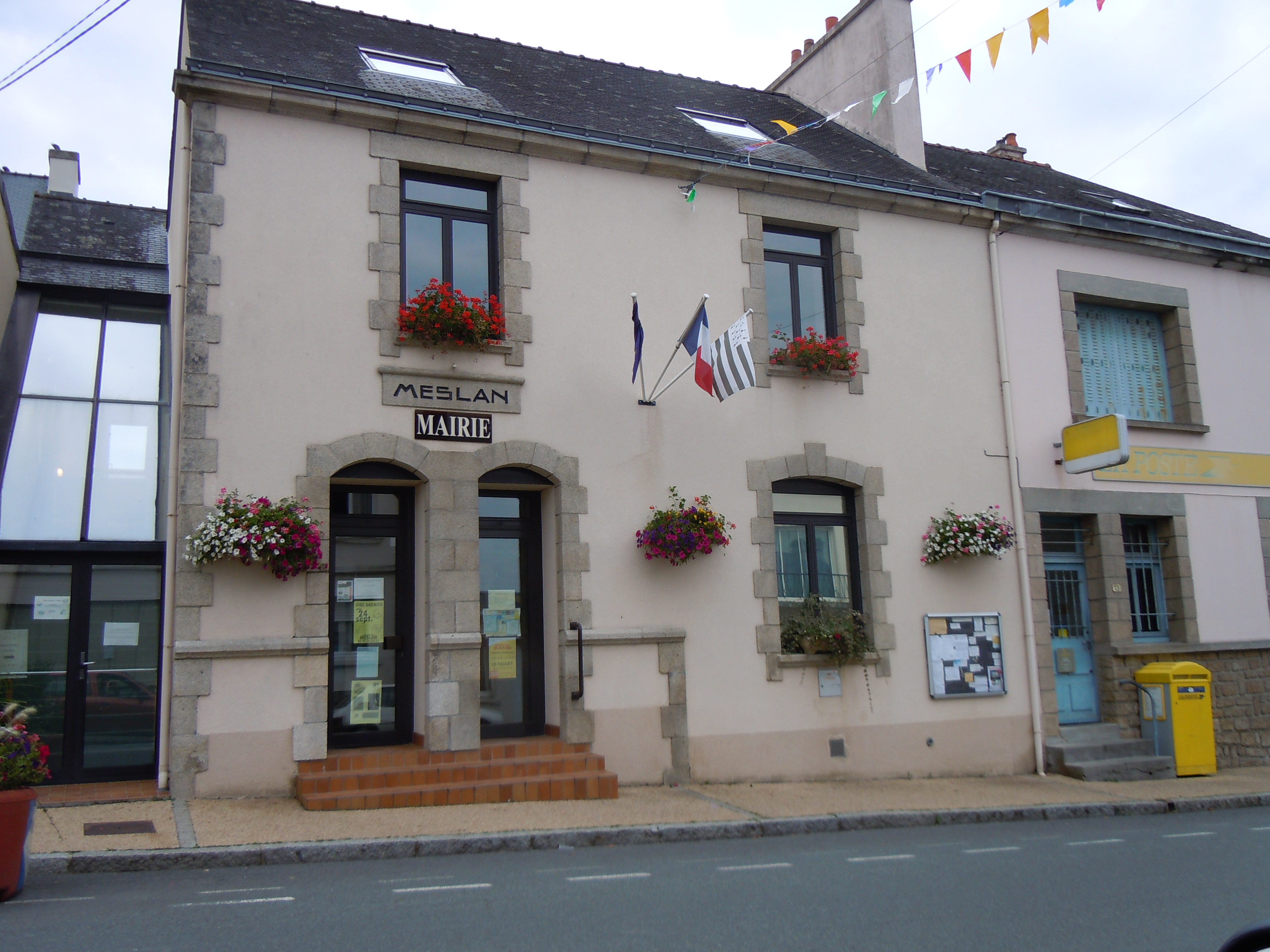 mairie de Meslan, département du Morbihan, France